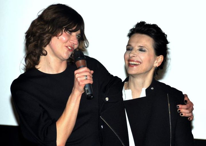 Malgoska Szumowska et Juliette Binoche à l'avant-première du film "Elles"